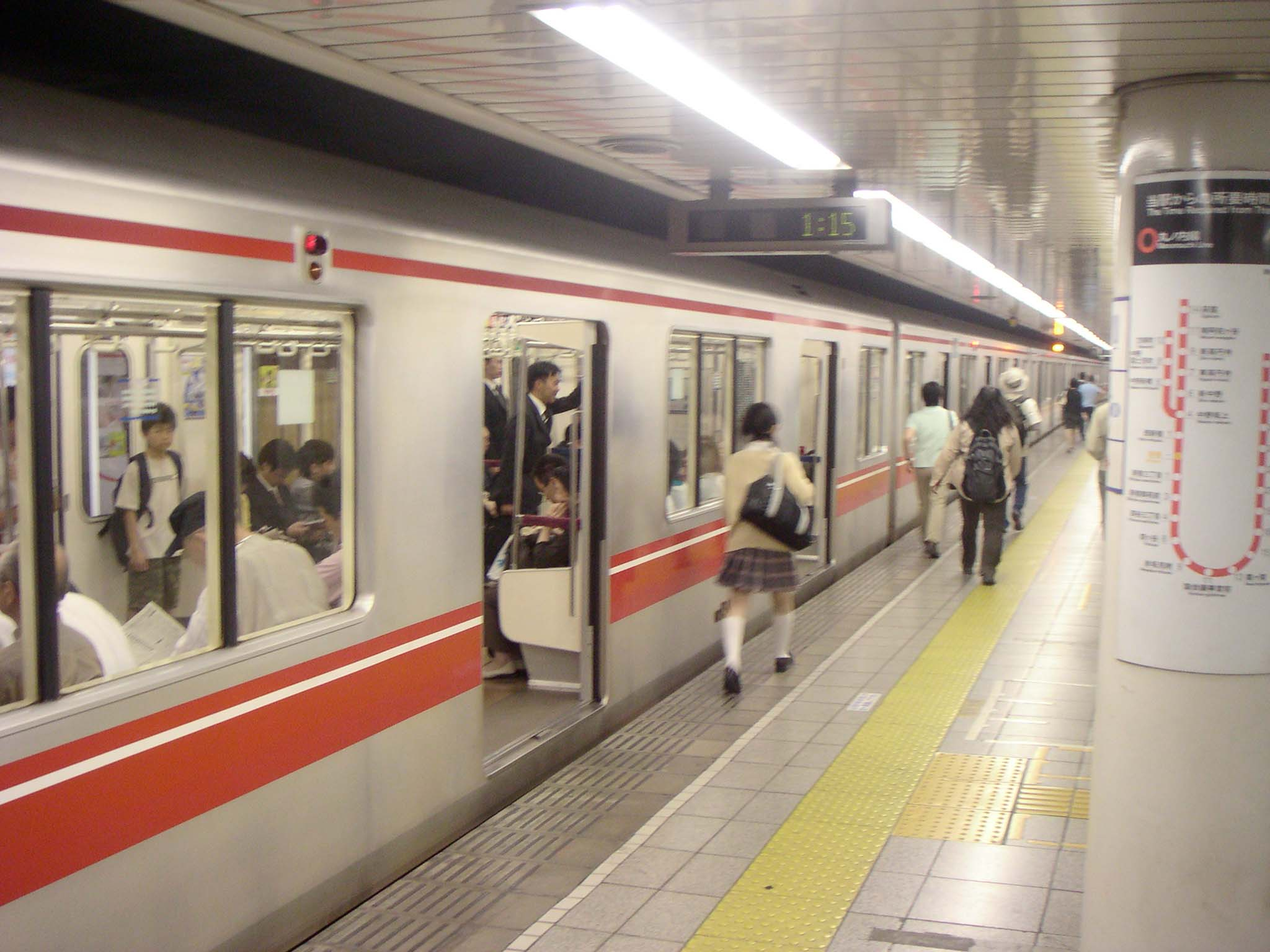 Shinjuku Station, Marunouchi Line